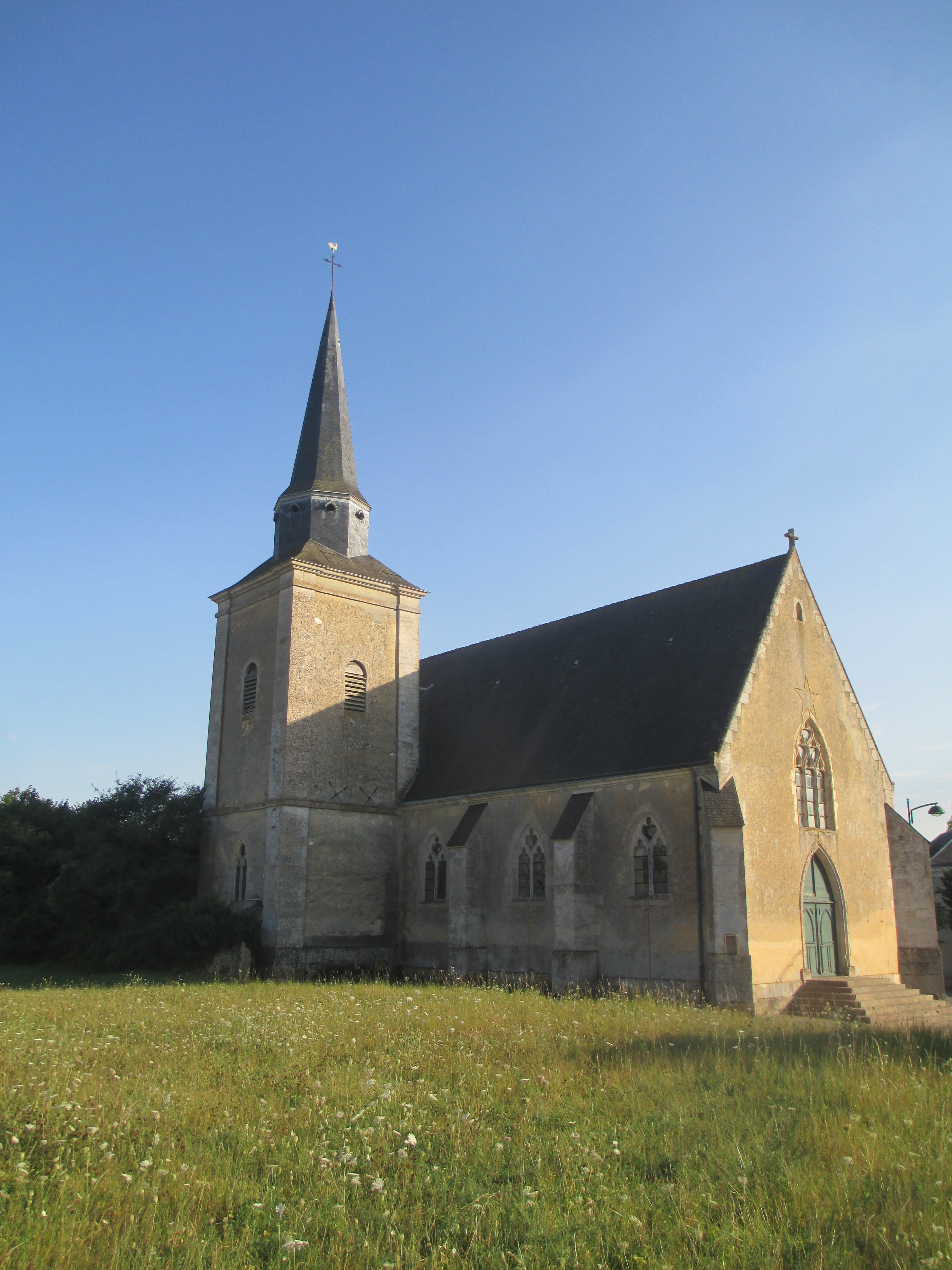 Église Saint-Germain de Chemilli, dans l'Orne.